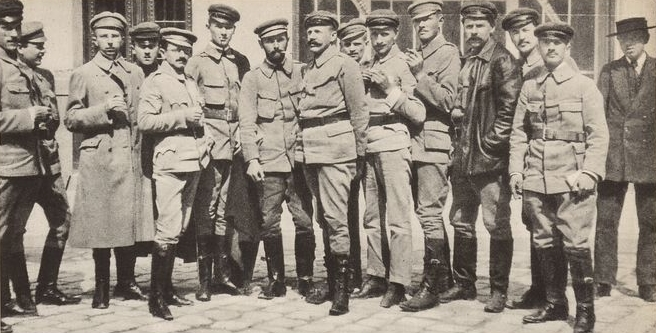 Zjazd Związku Strzeleckiego we Lwowie. Obecni: Szyszłowski, Machowicz, Adam Koc, Urbański, Tadeusz Wyrwa-Furgalski, Edward Rydz-Śmigły, Wacław Aleksandrowicz, Langman, Sladki, Kunc, Konst. Aleksandrowicz, Kuczyński.